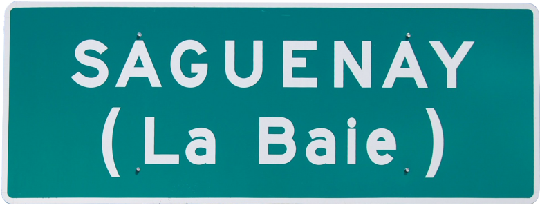 Panneau indicatif à La Baie